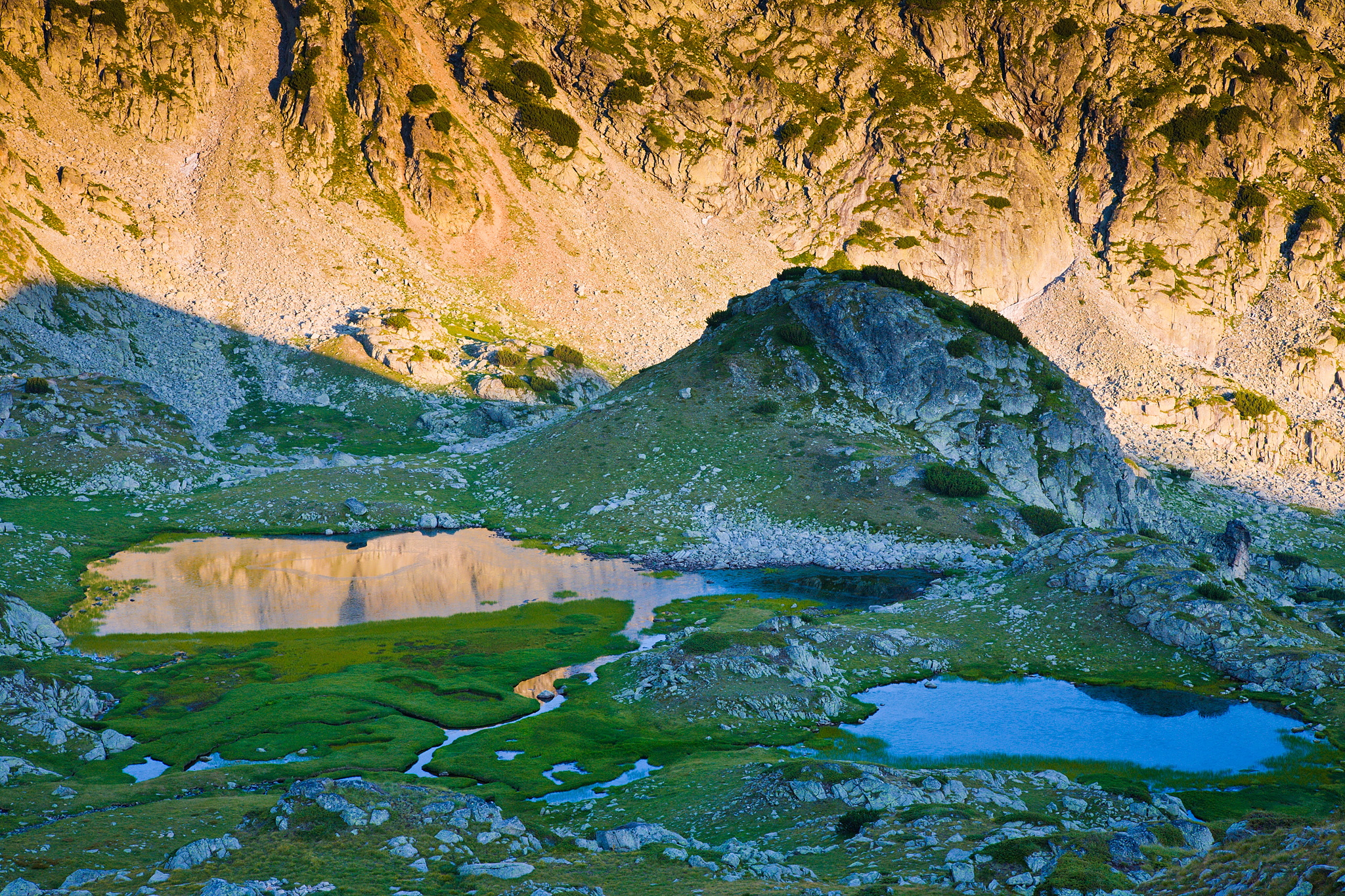 Пирин, Пирин, две от Белеметските езера